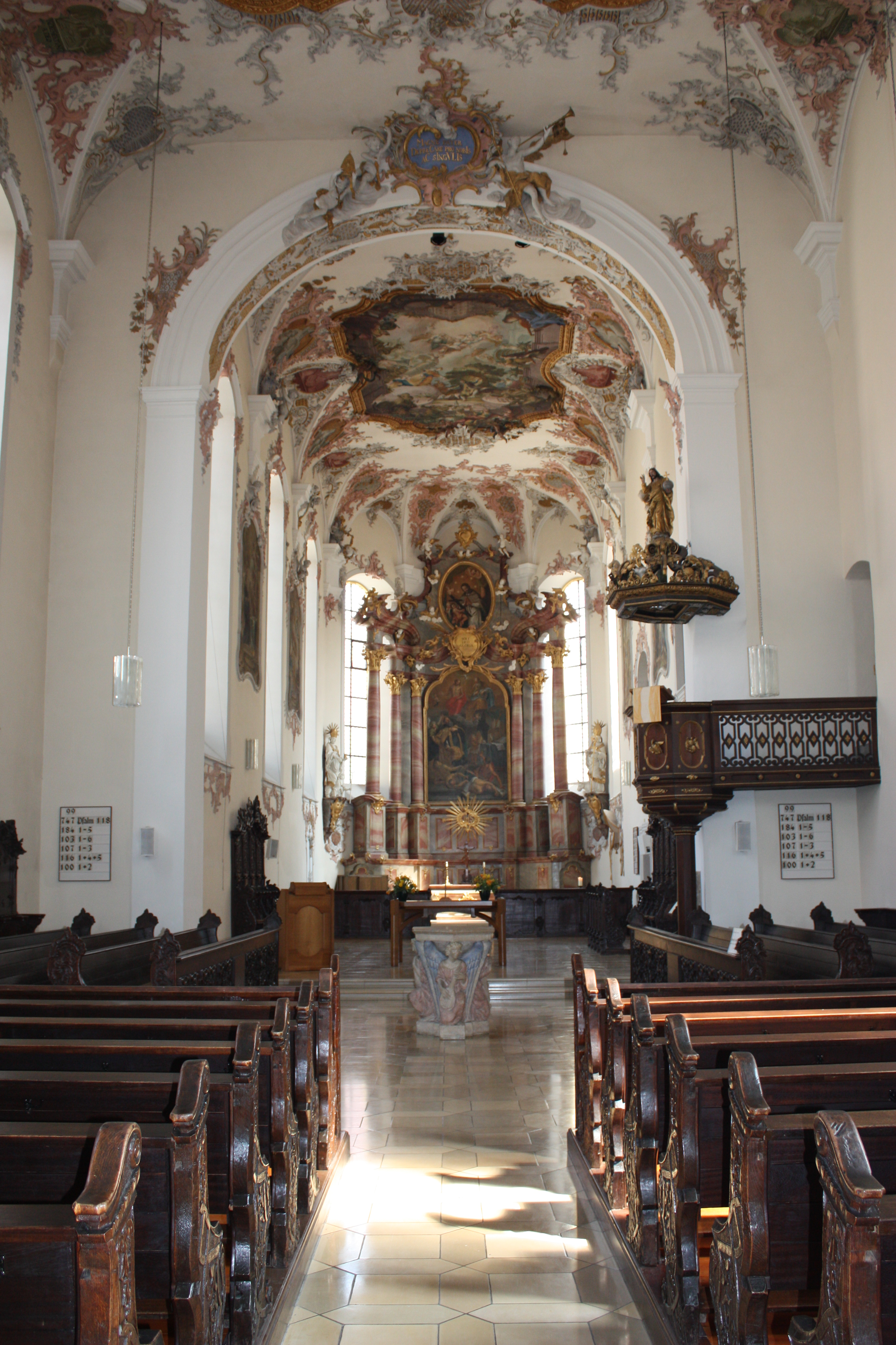 Innenraum von St. Augustinus Schwäbisch Gmünd